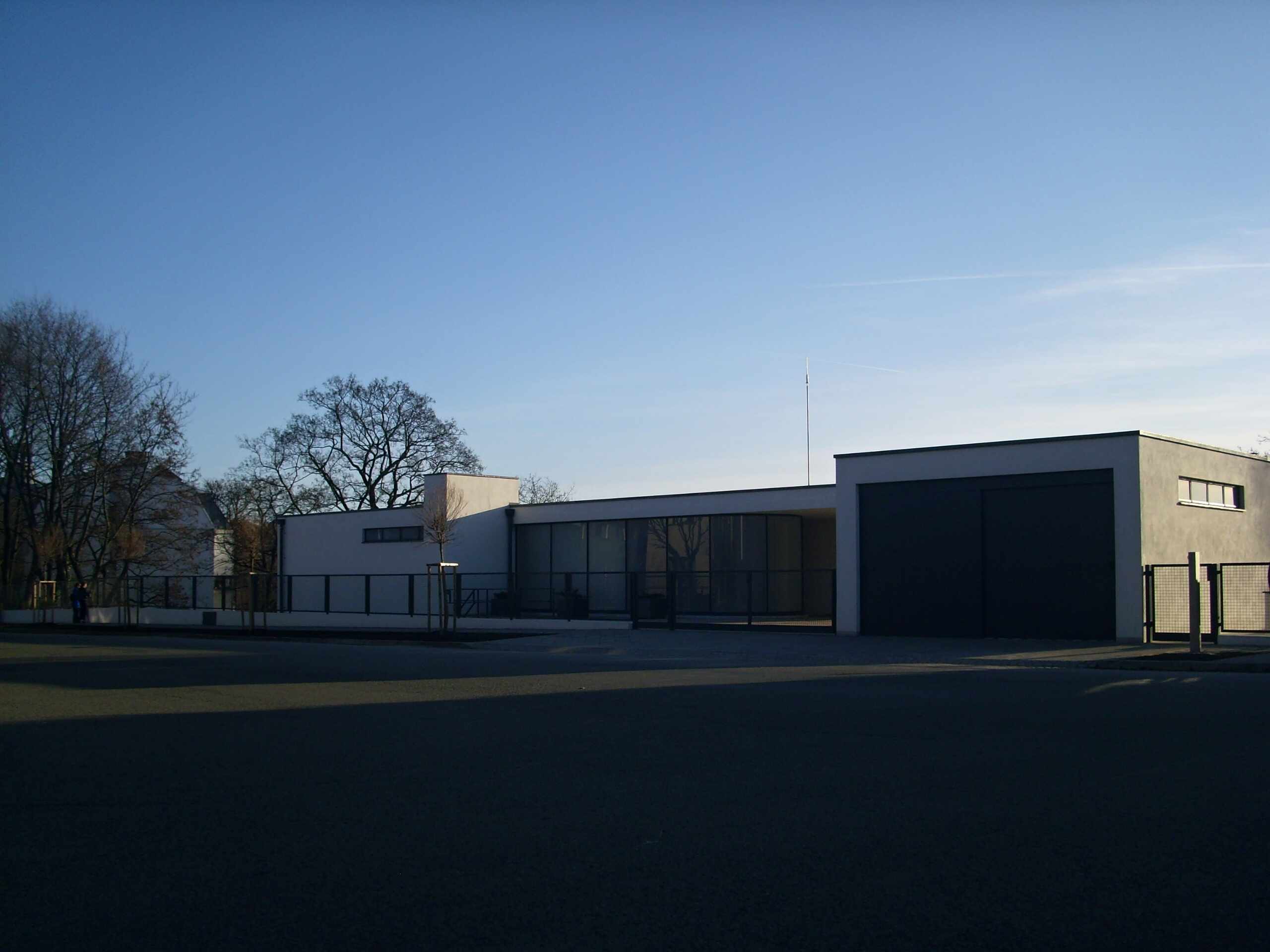 Vila Tugendhat, Brno, CZ. Po rekonstrukci v roce 2012.